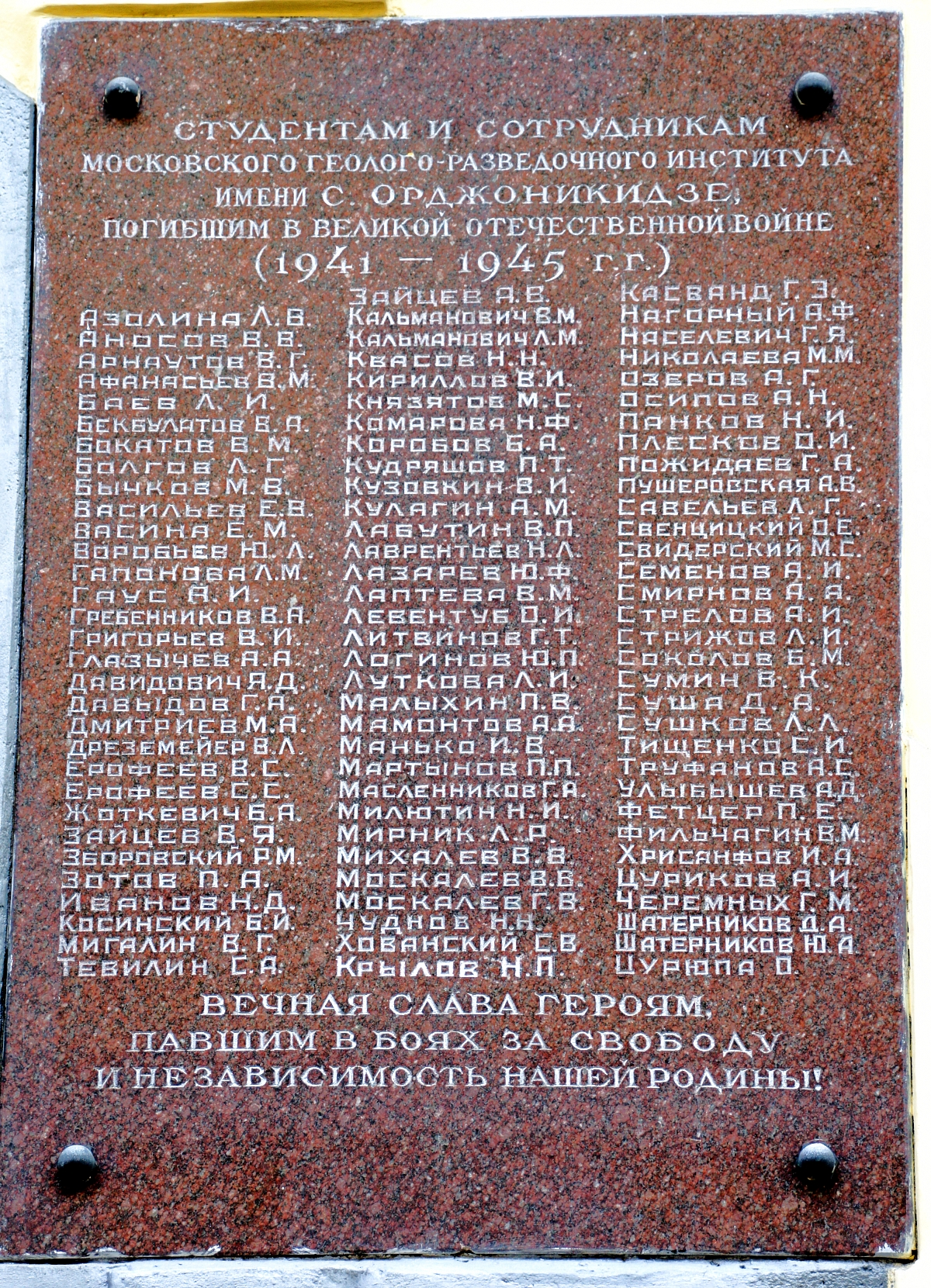 Мемориальная доска на стене Государственного геологического музея.